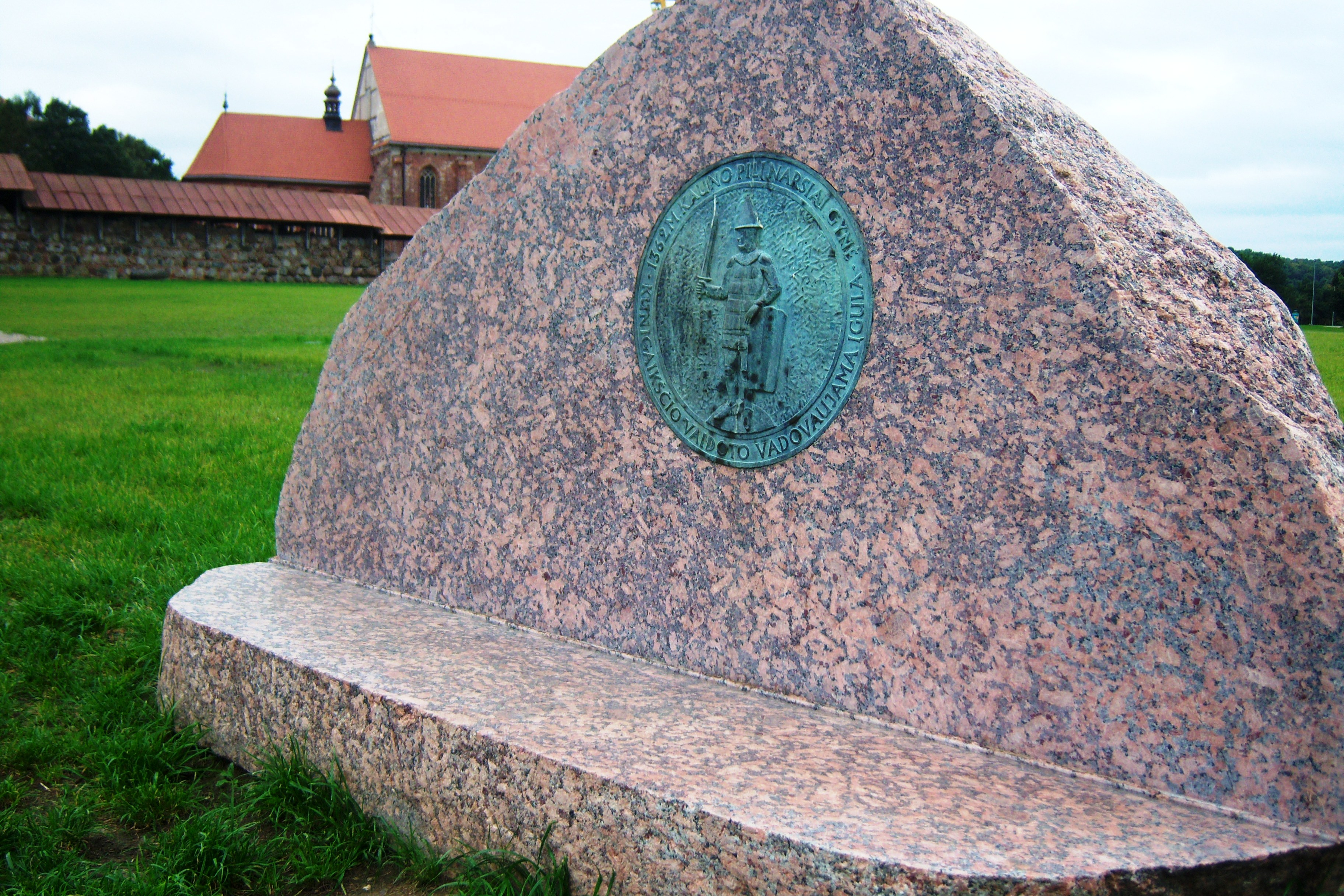 Atminimo akmuo prie Kauno pilies kunigaikščiui Vaidotui